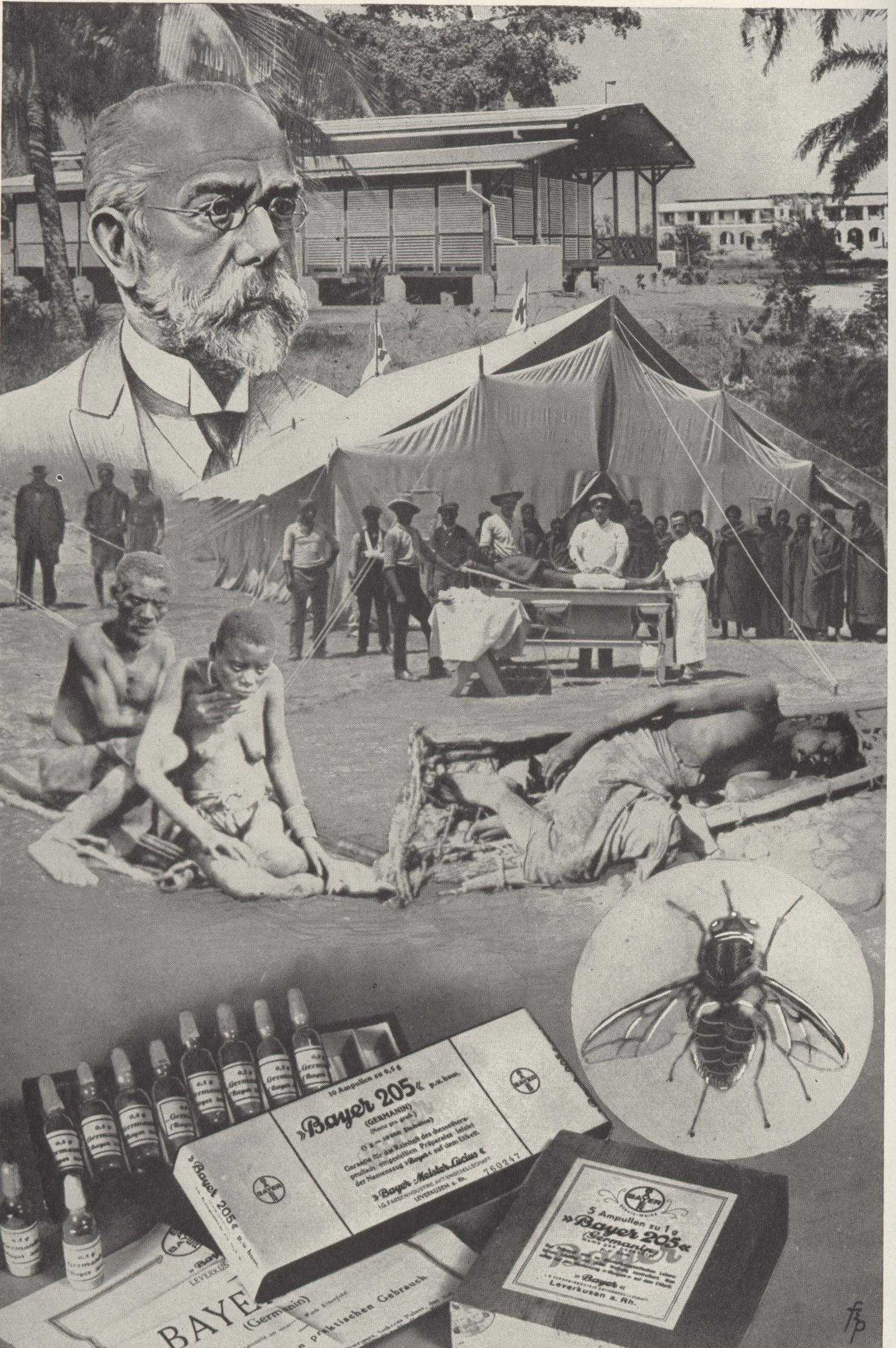 Kollagenbild zum Thema Schlafkrankheitsbekämpfung in den Deutschen Kolonien und zum Medikament Bayer 205